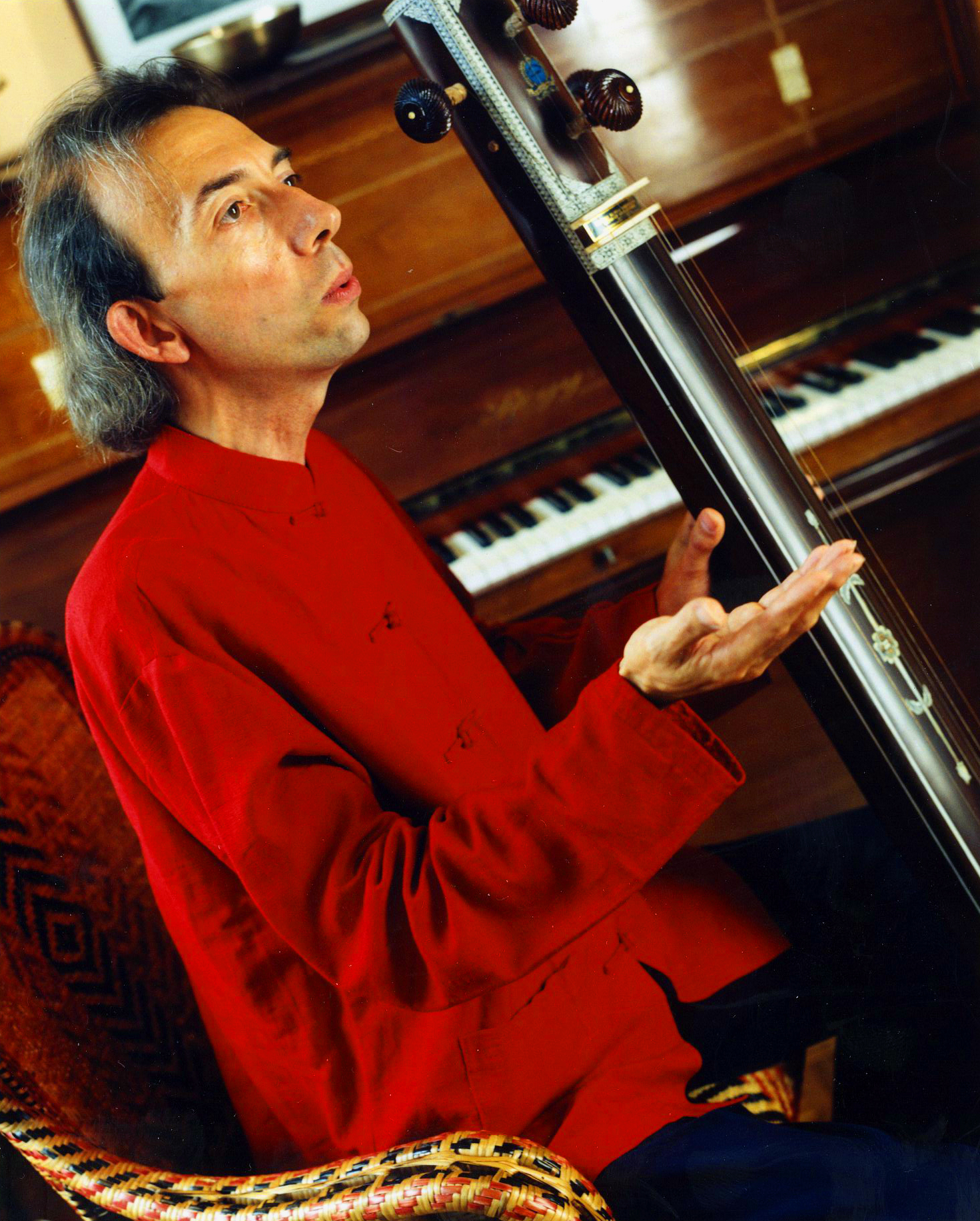 Philippe Barraqué musicologue musicothérapeute